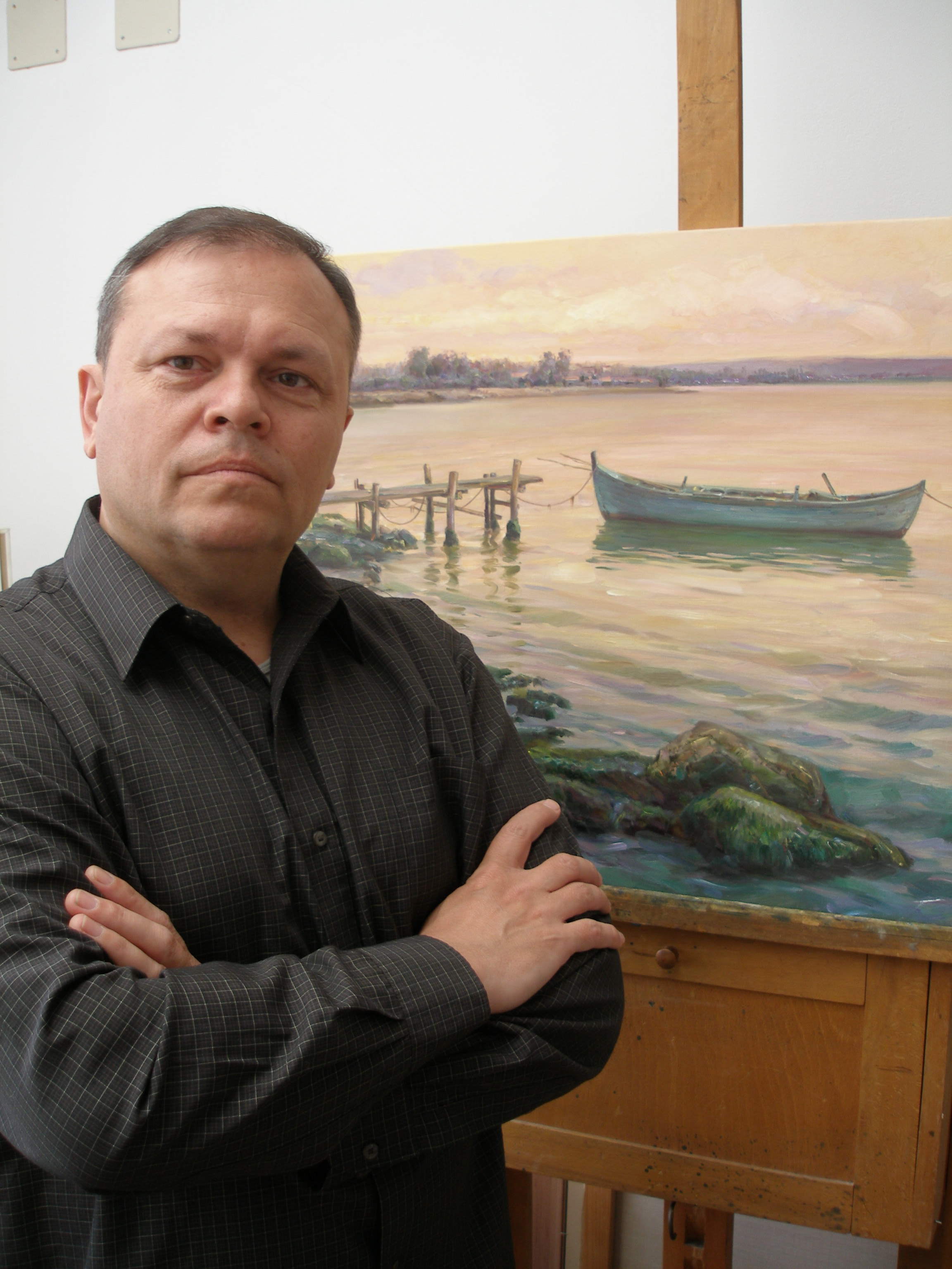 Александър Алексиев - Хофарт в ателието си.